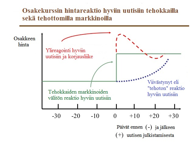 Vihreä viiva kuvaa tehokkaiden markkinoiden välitöntä hintareaktiota hyviin uutisiin, jolloin osakkeen hinta nousee heti uutisten julkistamishetkellä (0). Punainen katkoviiva kuvaa mahdollista positiivisten uutisten ylireagointia sekä sen jälkeistä kurssin korjausliikettä. Sininen katkoviiva sen sijaan kertoo viivästyneestä eli "tehottomasta" hintareaktiosta hyviin uutisiin.